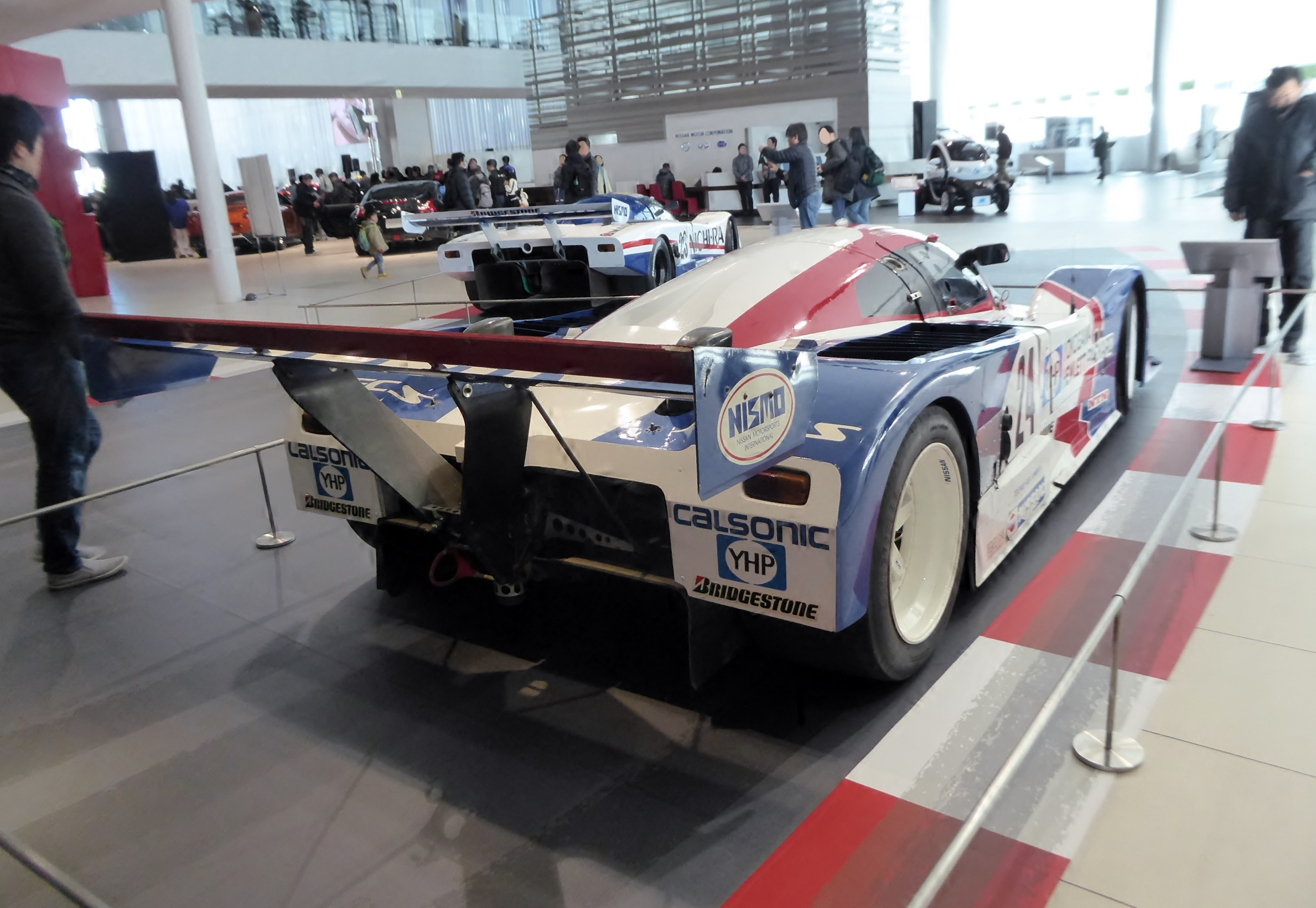 日産グローバル本社ギャラリーにて日産・R88Cをリアから撮影。